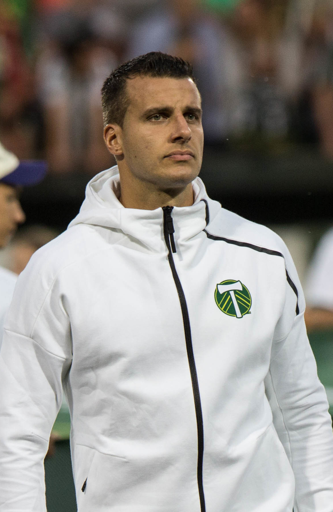 N42A3445.jpg